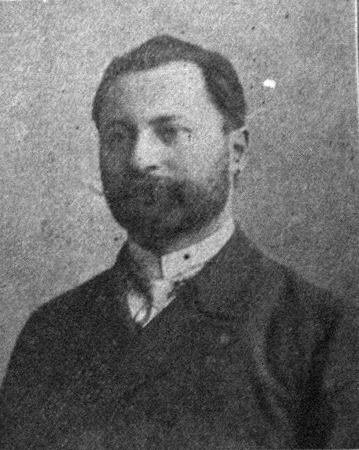 Österreichischer Politiker, Reichsratswahl 1907, Name siehe Dateiname